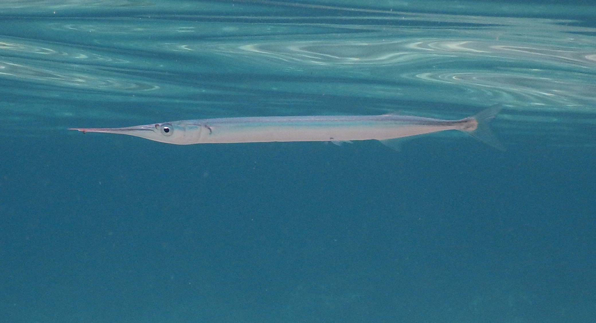 Aguglia (Belone belone) in Sardegna, settembre 2015